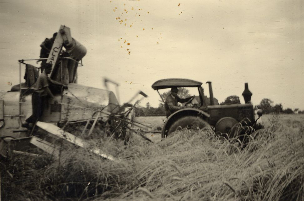 Haus Traar 1952 – Lanz Bulldog vor einem Claas Super, 1951 einer der ersten Mähdrescher am linken Niederrhein